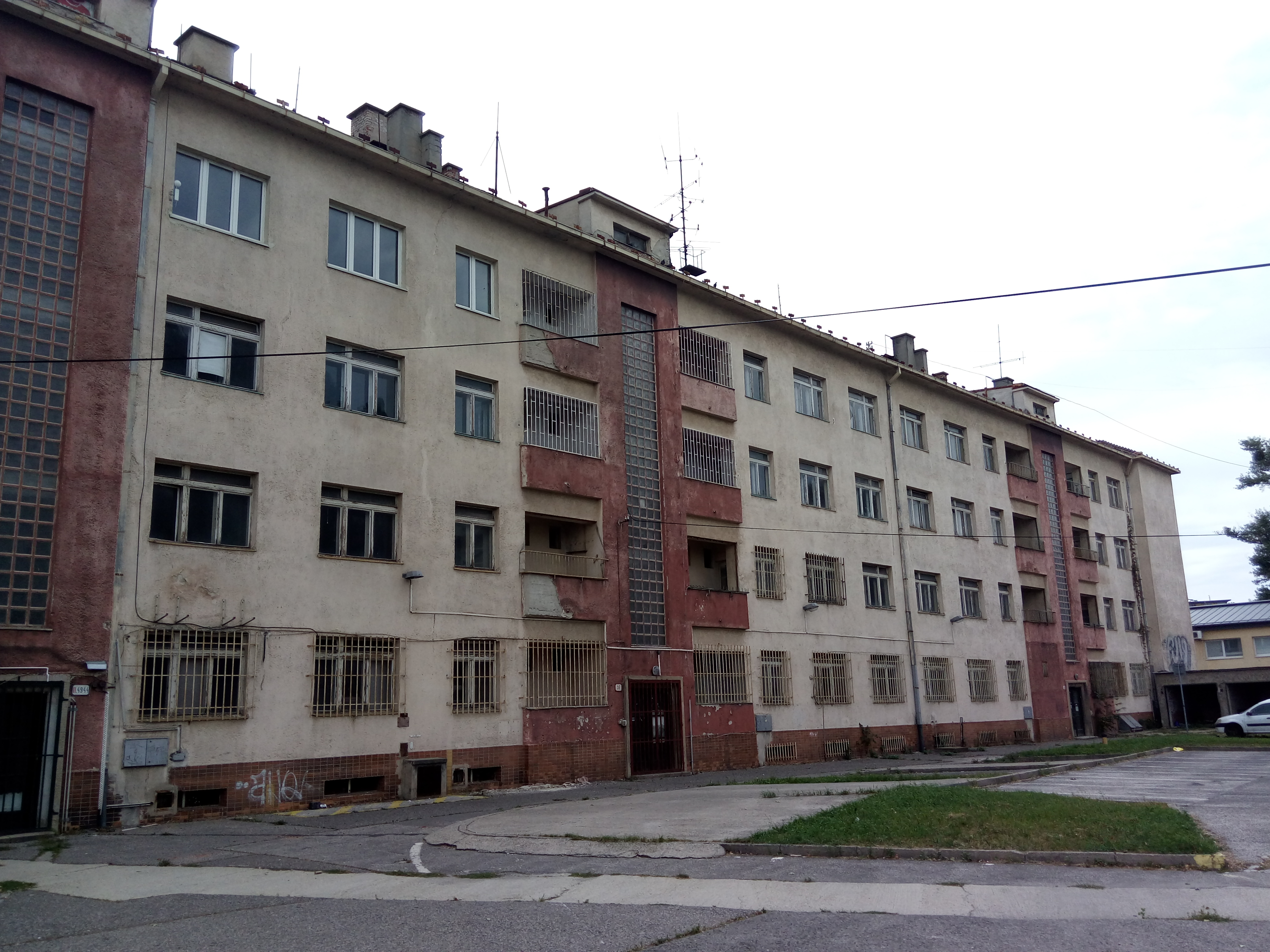 Mlynské nivy 37-41, Ružinov, Bratislava